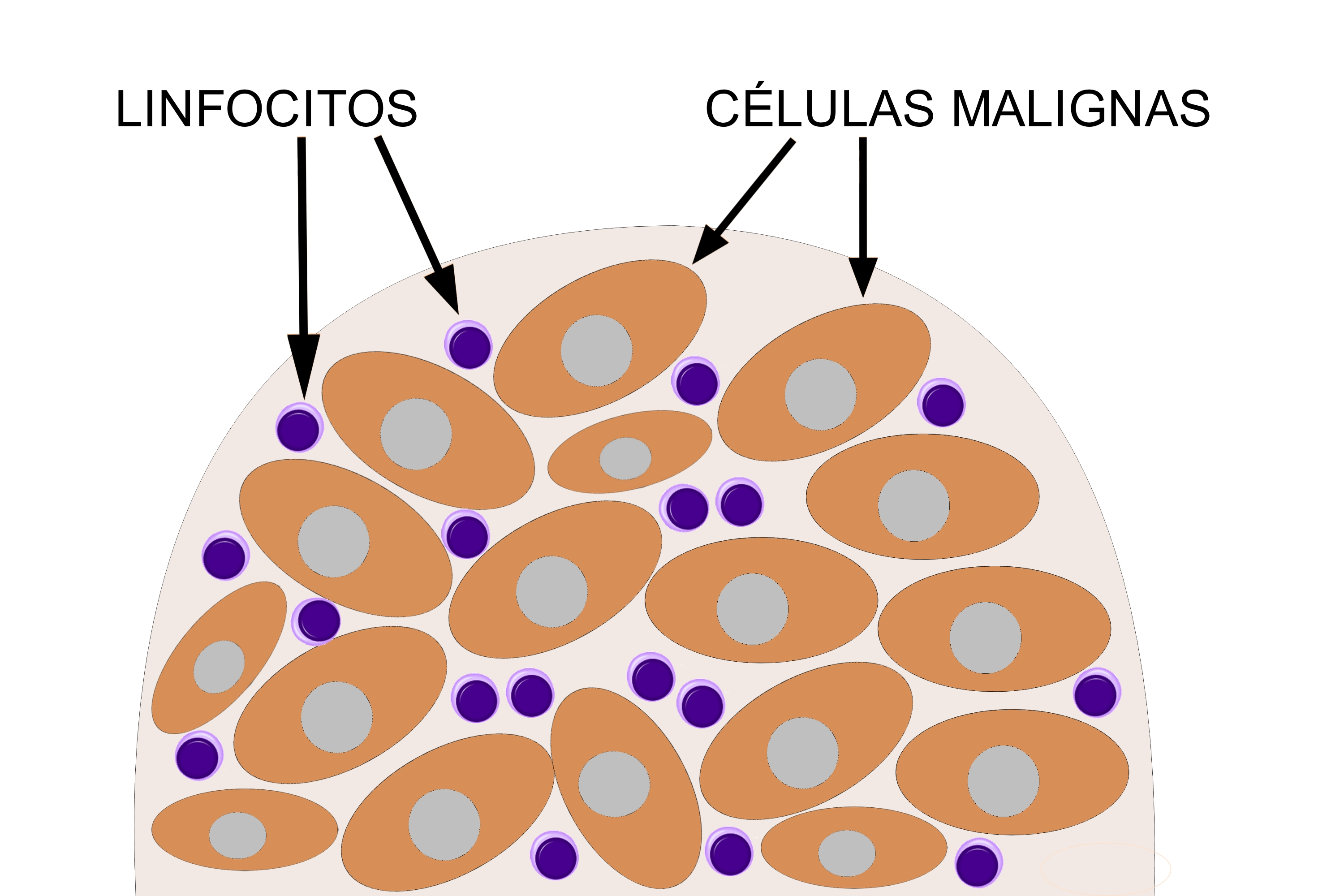 Esquema en el que se representan linfocitos infiltrantes de tumor (TIL) situados entre las células malignas de un tejido canceroso.